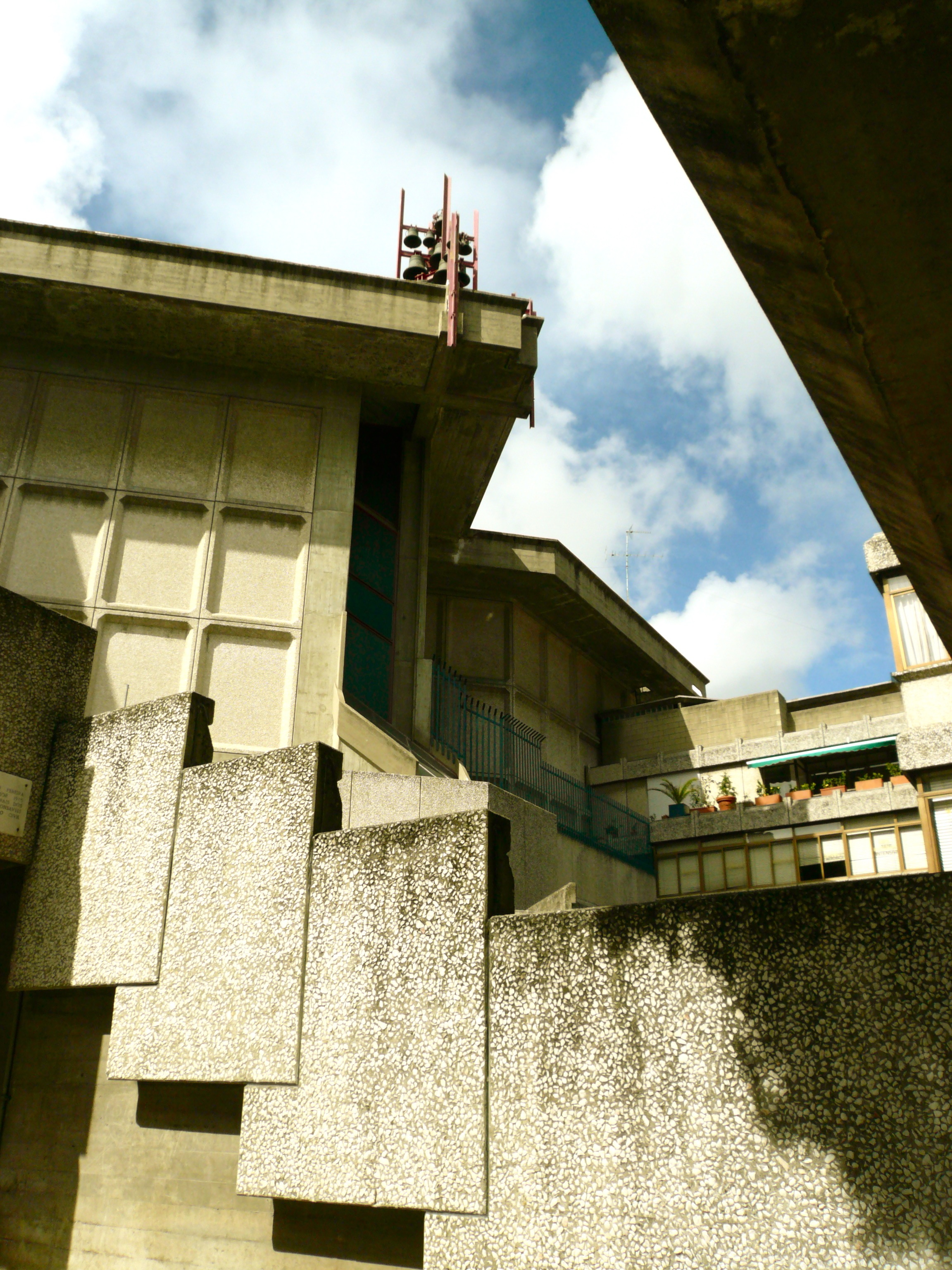 Igreja do Sagrado Coração de Jesus na rua Camilo Castelo Branco, freguesia do Sagrado Coração de Jesus, concelho e distrito de Lisboa. É obra dos arquitectos Nuno Portas e Nuno Teotónio Pereira, tendo-lhe sido atribuído o Prémio Valmor de 1975, e classificada Monumento Nacional em 2010.